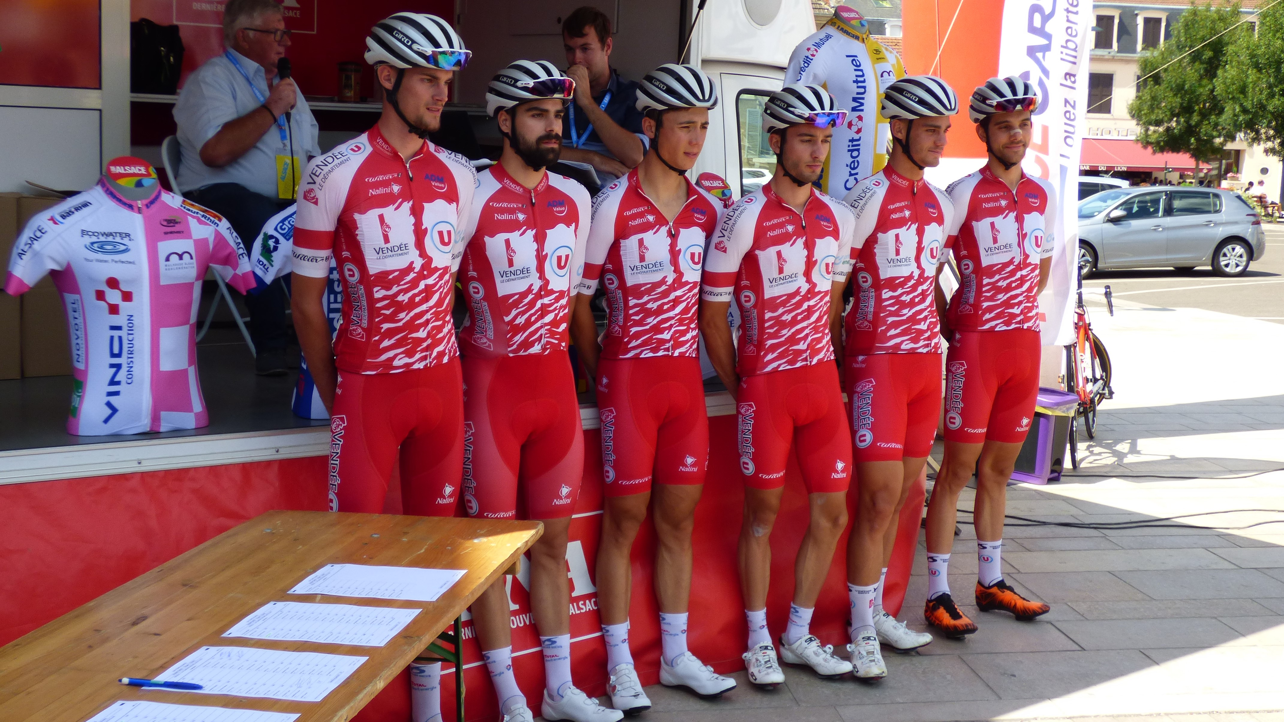 Tour Alsace 2019 - Présentation de l'équipe Vendée U au départ de la troisième étape à Vesoul. Depicted people: Louis Pijourlet, Thomas Champion, Thomas Denis, Valentin Ferron, Marlon Gaillard and Théo Menant